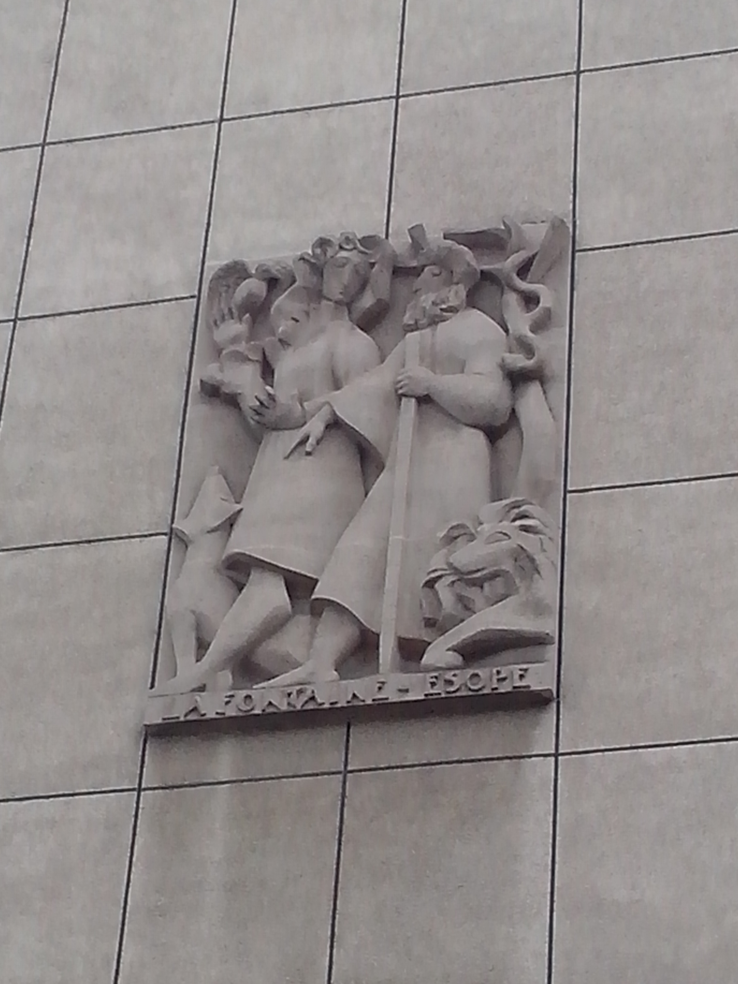 Sculpture sur un immeuble, rue des recollets à Paris